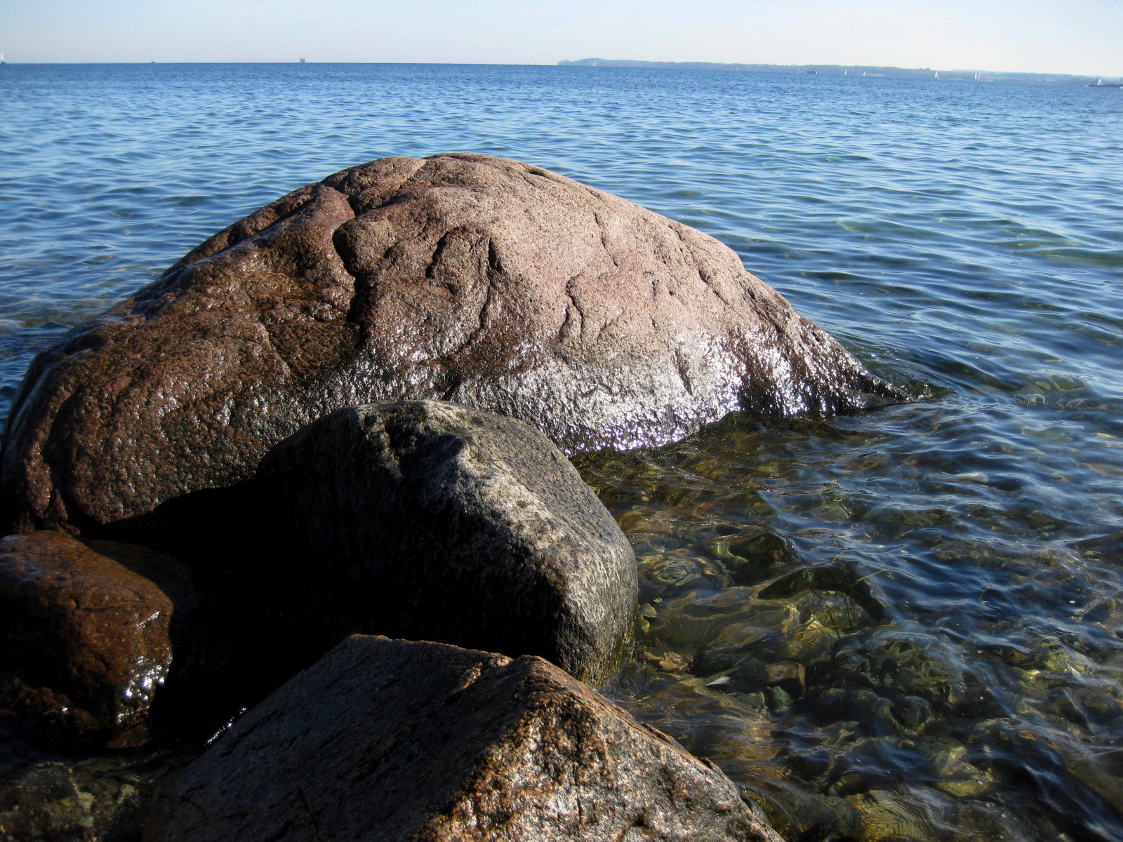 Mövenstein in Travemünde. Oben rechts der Priwall mit auf Mecklenburger Seite liegender Steilküste